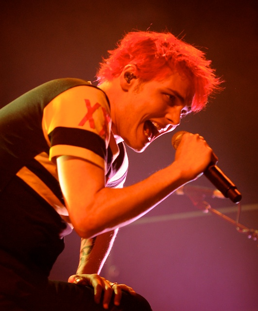 Gerard Way presentándose junto a My Chemical Romance en Montreal, Canadá, durante la gira Honda Civic Tour, el 16 de agosto de 2011.